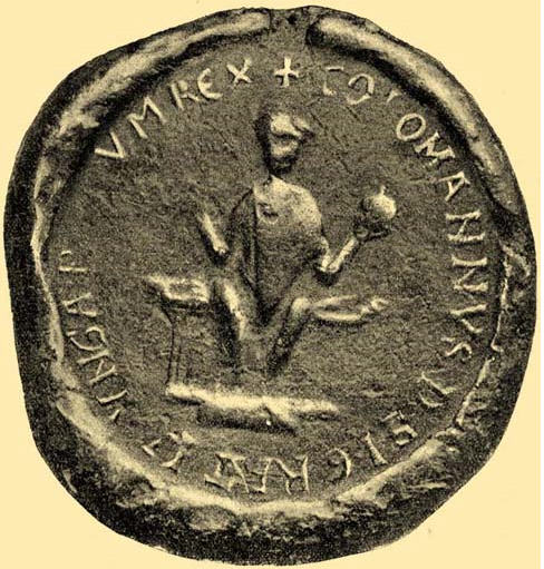 Koloman pečeť